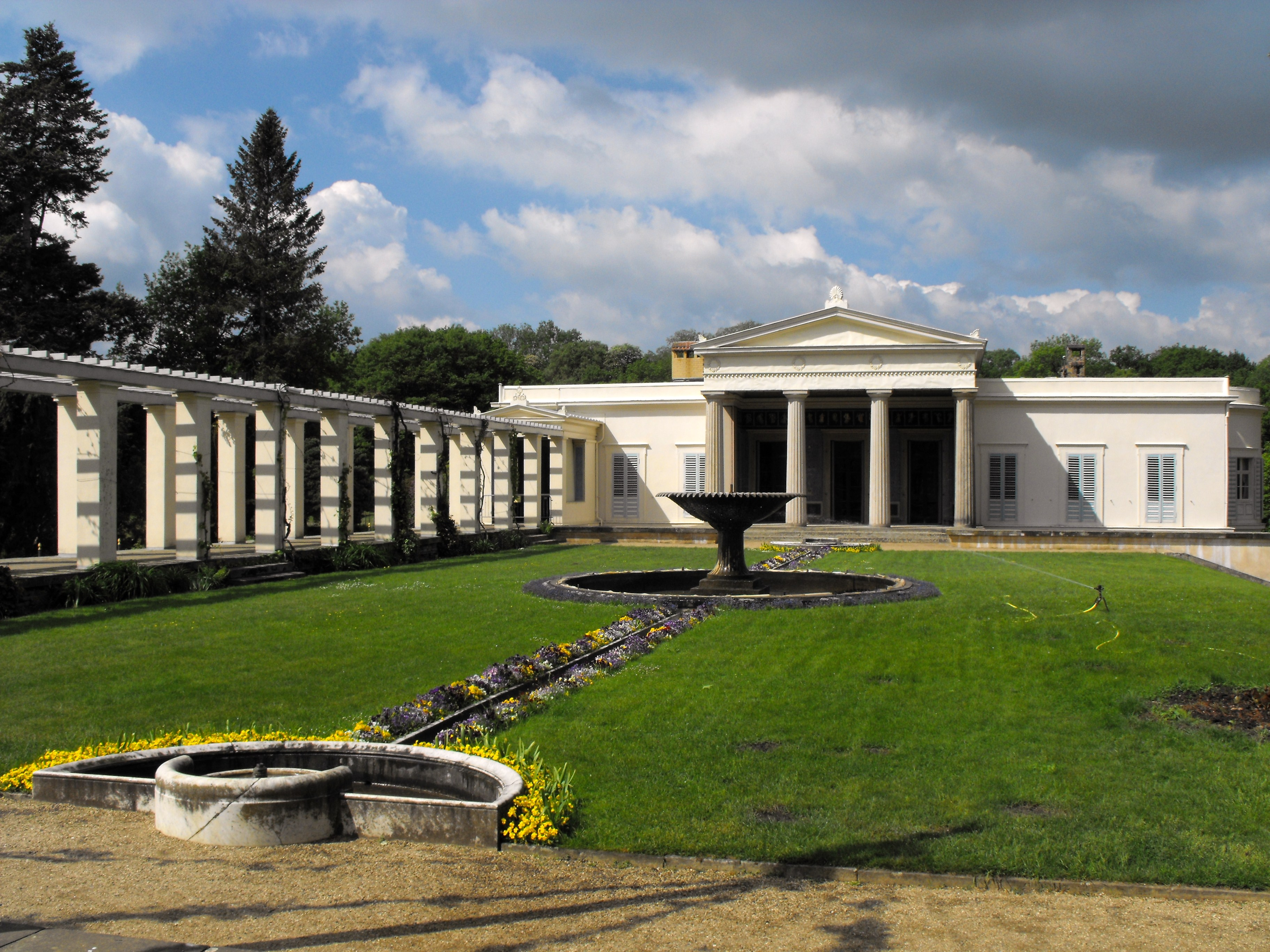 Schloss Charlottenhof Sanssouci 2011 Gartenbereich